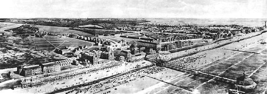 Panorama van Scheveningen rond 1902 door Ernst Hesmert